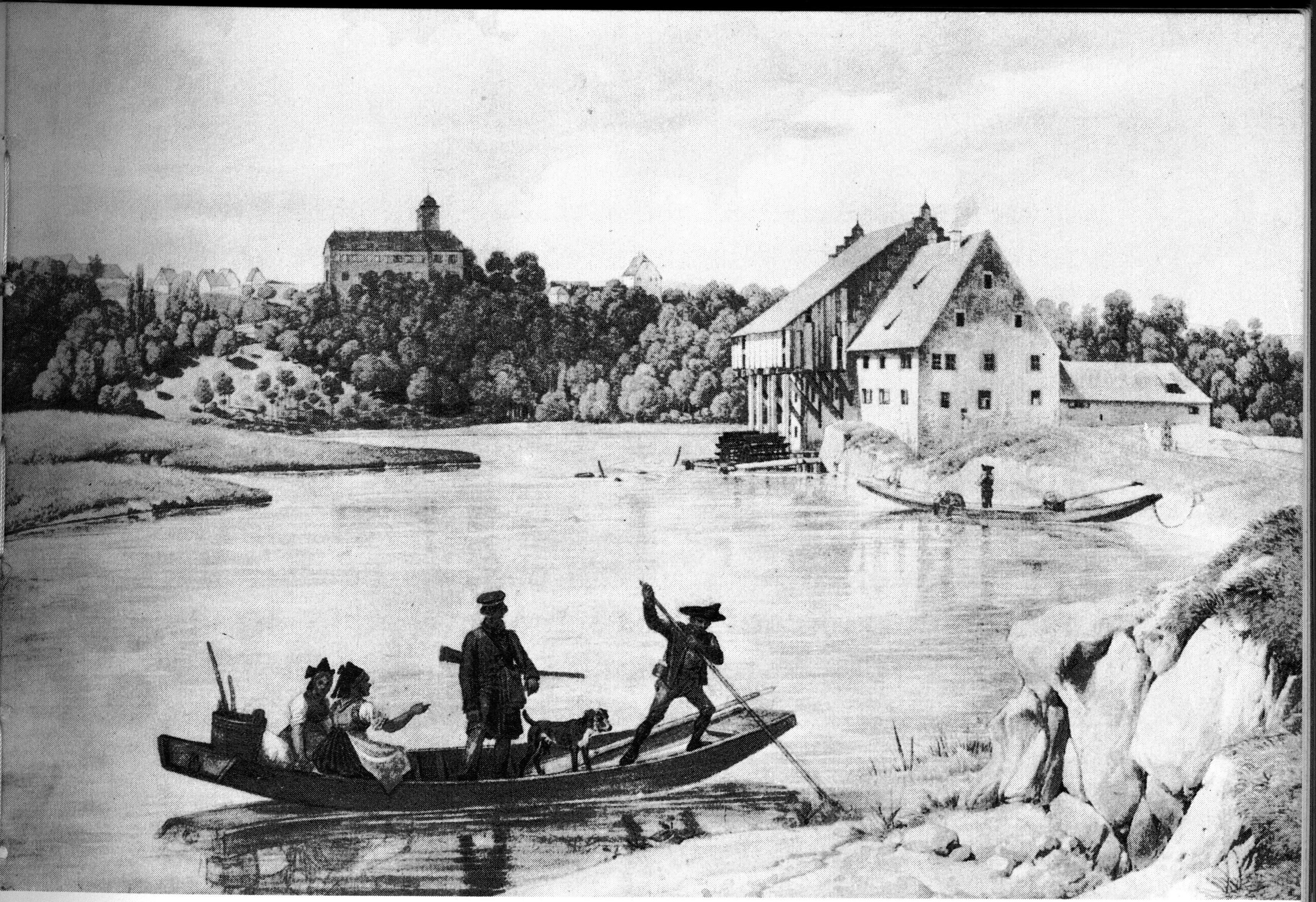 Mainmühle des Klosters Pons Mariae in Astheim. Im Hintergrund die Hallburg.